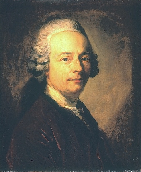 Bildnis des Dichters Karl Wilhelm Ramler, nach 1771